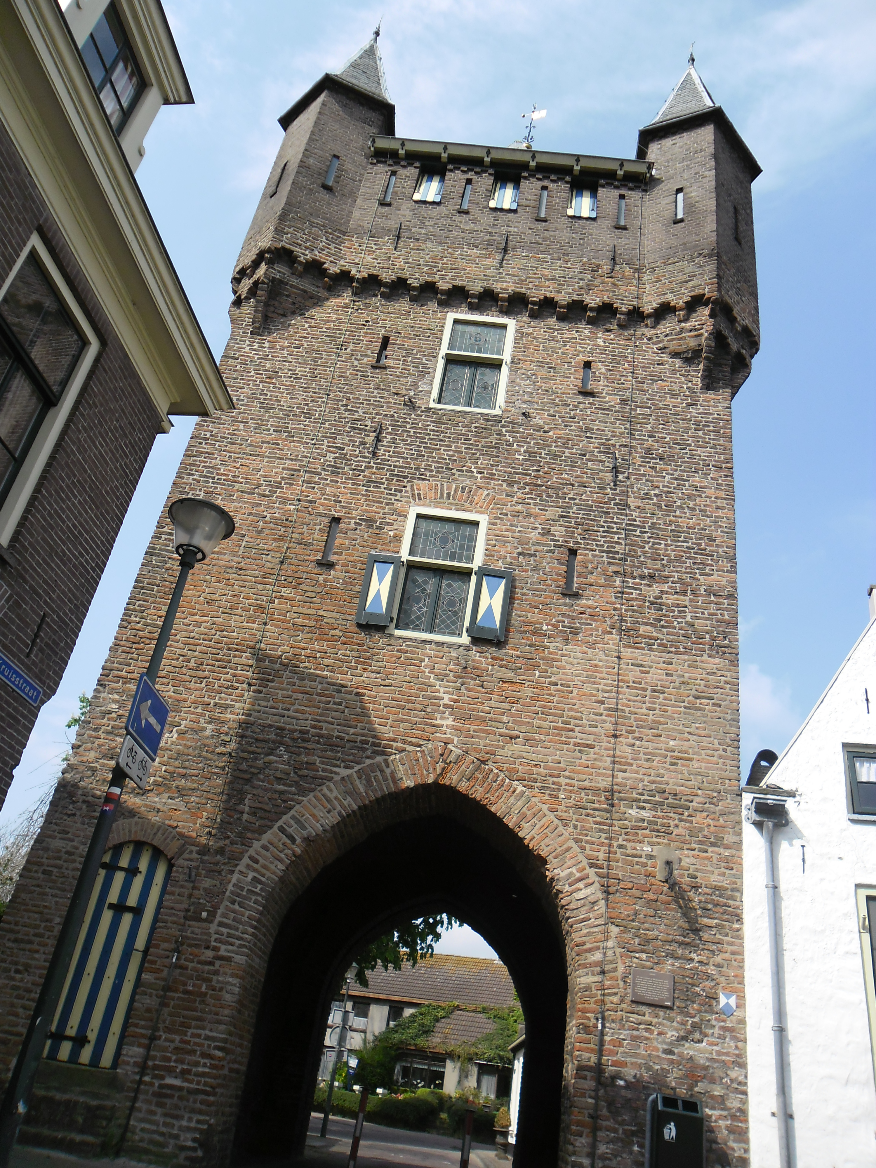 Dijkpoort in Hattem vanaf de voorzijde, richting stad/centrum.